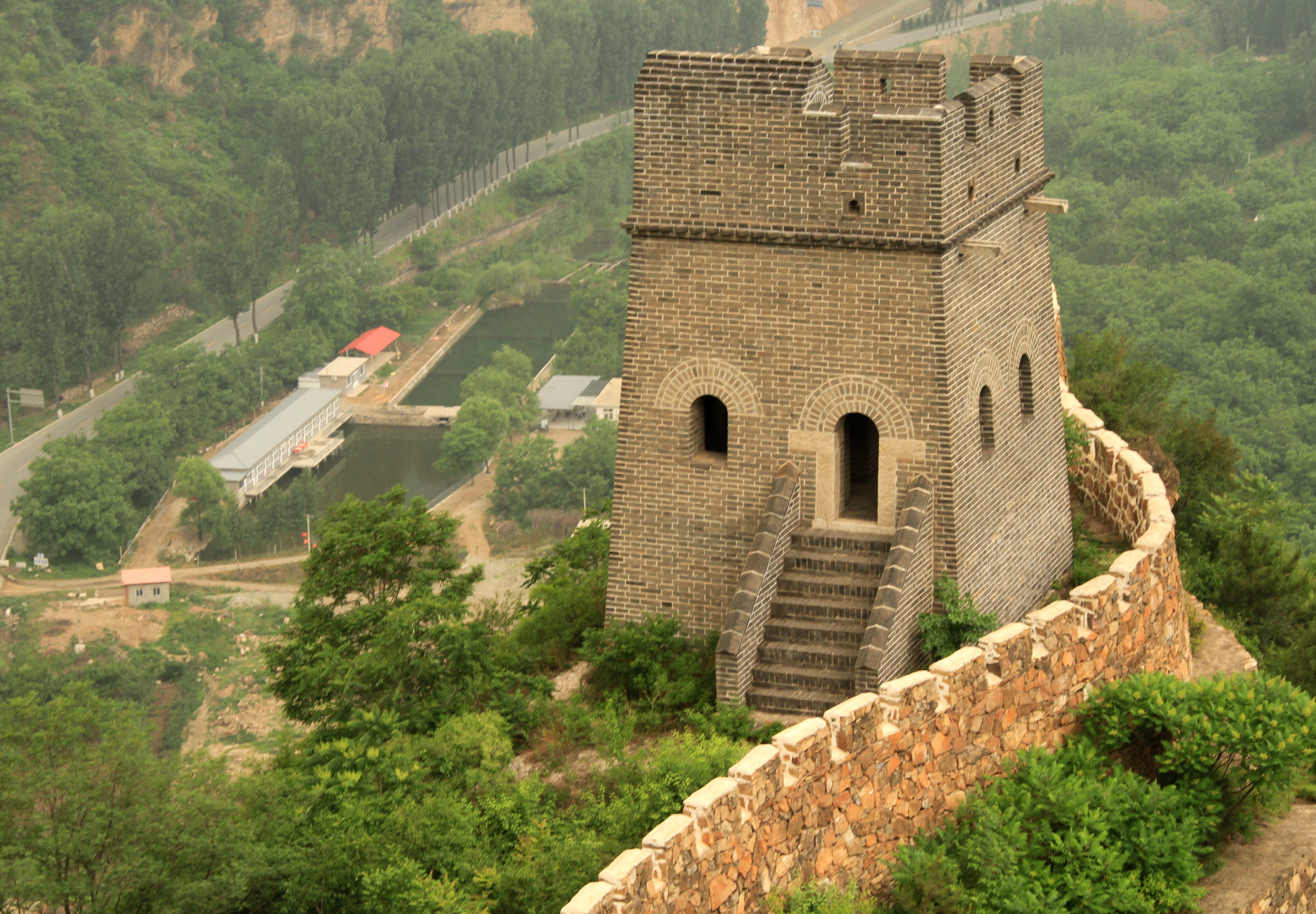 Taipingzhai to Huangyaguan 15